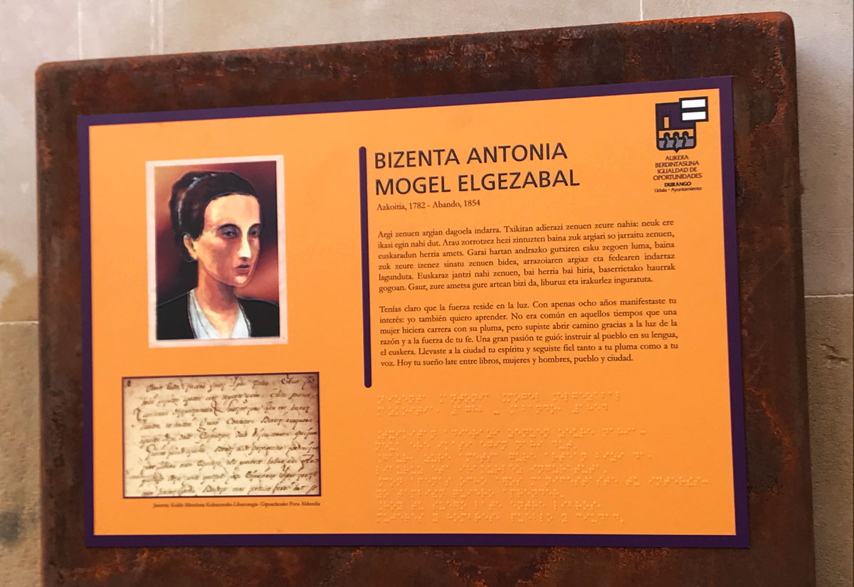 Placa dedicada a Bizenta Mogel en la biblioteca de Durango